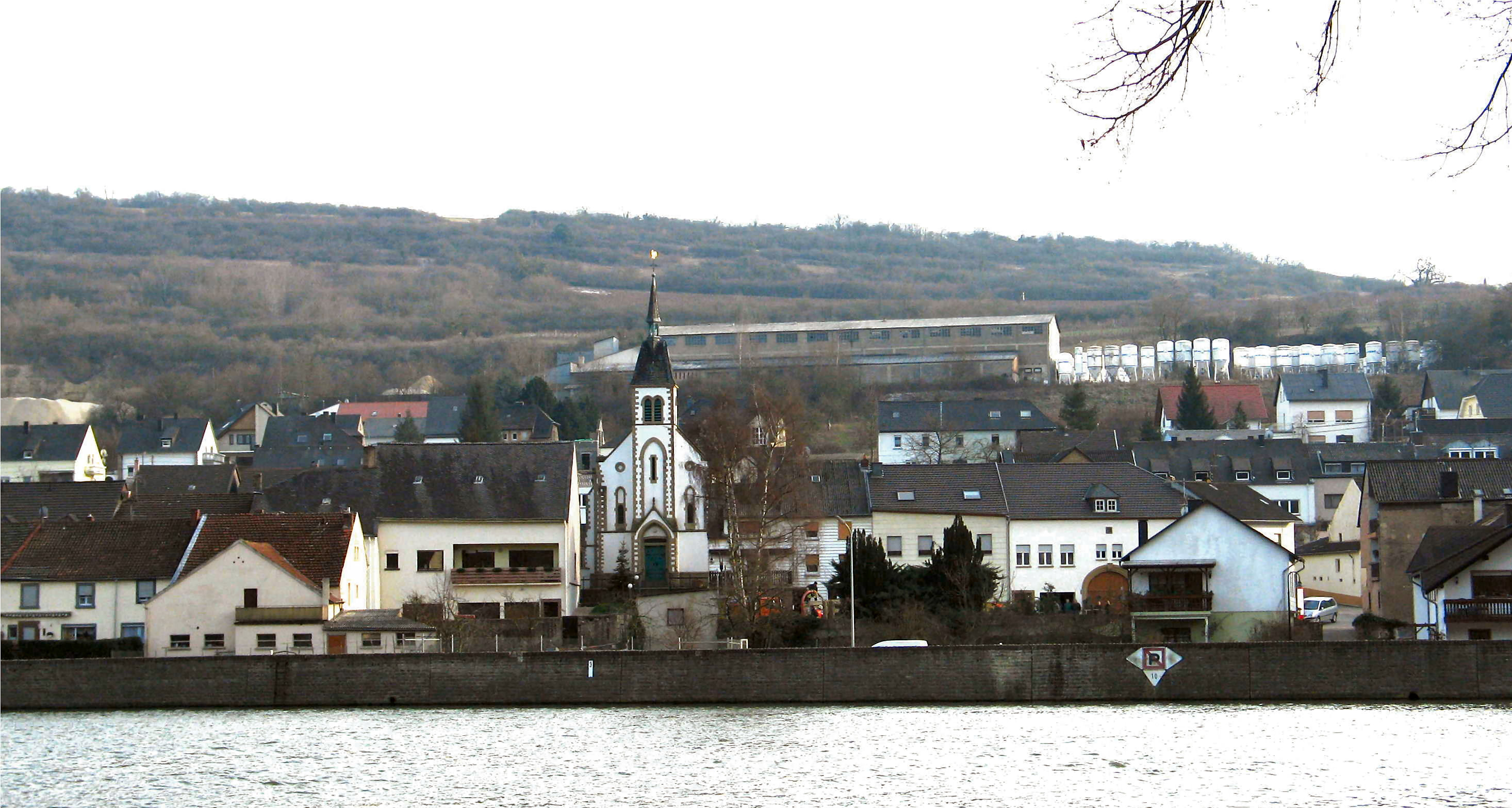 Wellen